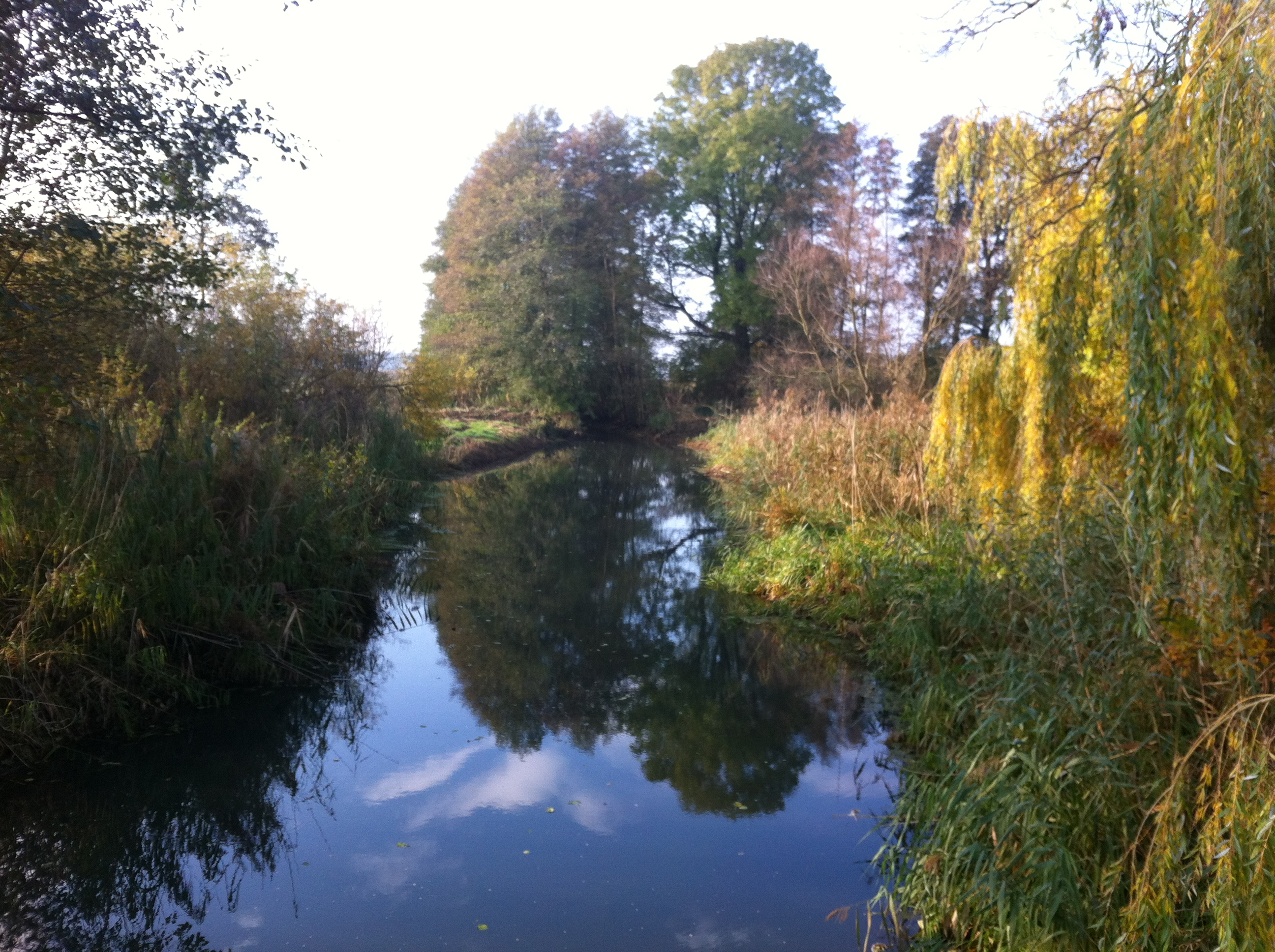 Stremme bei Neuenklitsche hinter dem Neuenklitscher Wehr